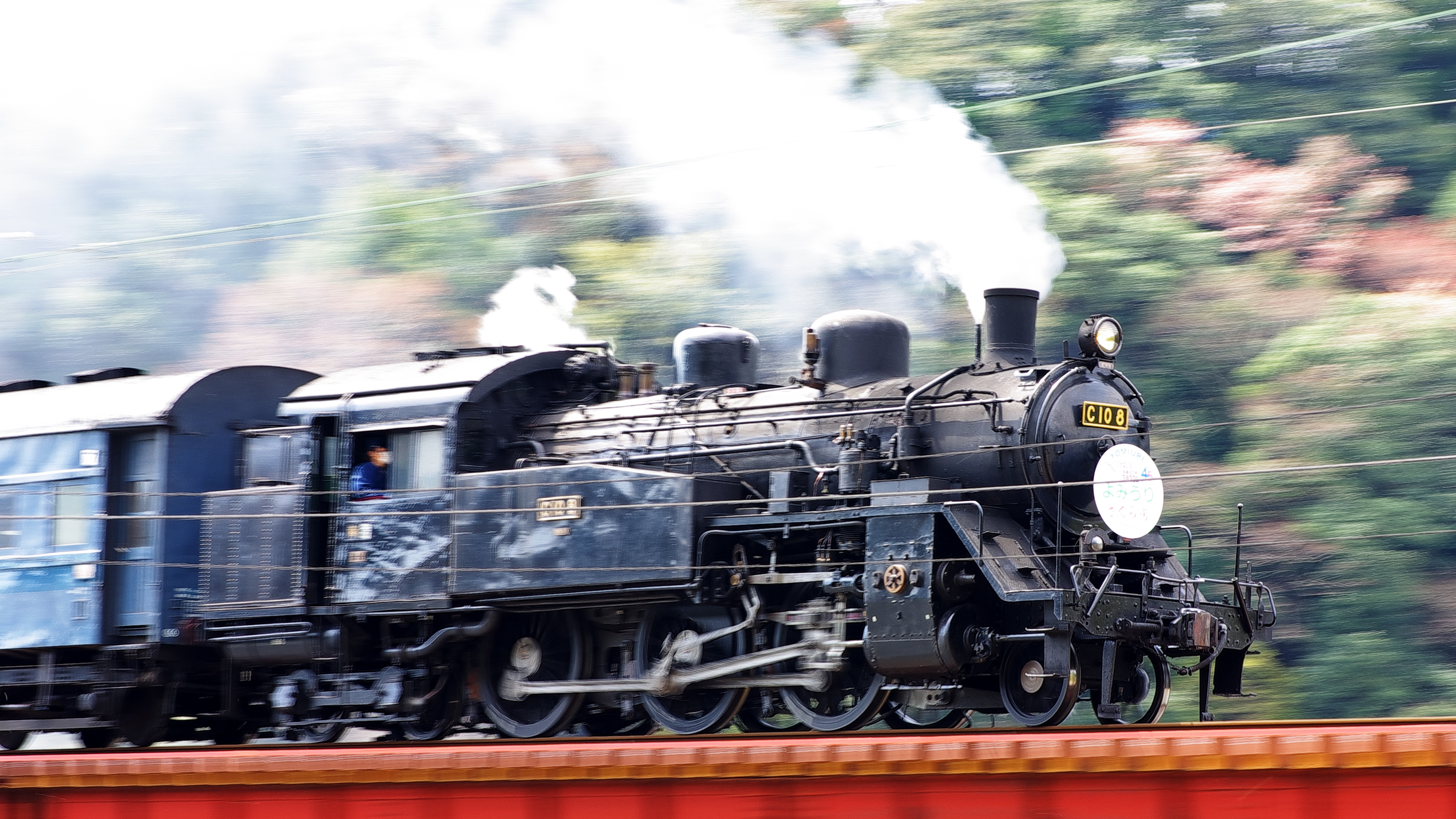 大井川鐡道 C10 8 よみうりさくら号